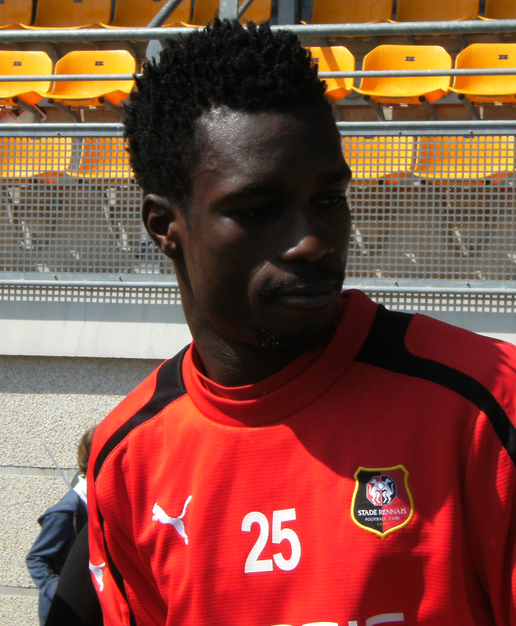 Photo prise lors d'un entraînement du Stade rennais au stade de Marville de Saint-Malo le 3 mai 2013. Ici, John Boye.